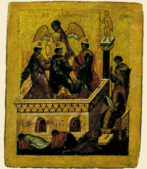 The Four Men in the Fiery Furnace. Три отрока в пещи огненной (Четвертый - это архангел Михаил)